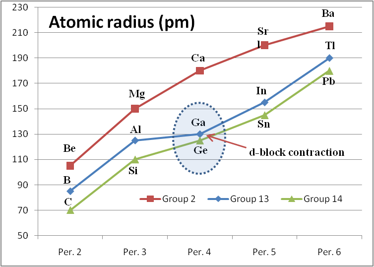 Atomic radius of elements of the groups 2,13 and 14. It shows "d block contraction", especially for Ga and Ge